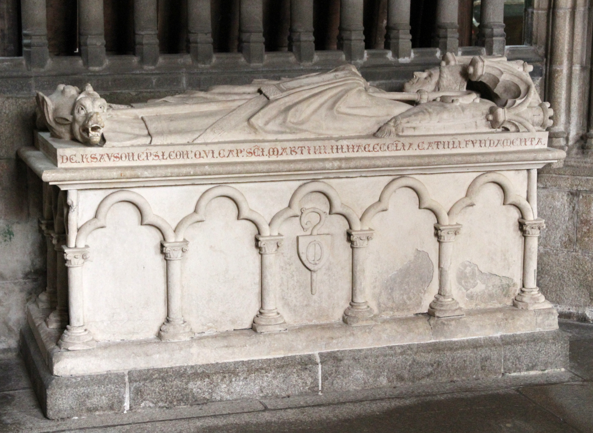 Gisant de Guillaume de Kersauson, évêque de Léon 1292, + 1327 - Cathédrale Saint-Paul-Aurélien